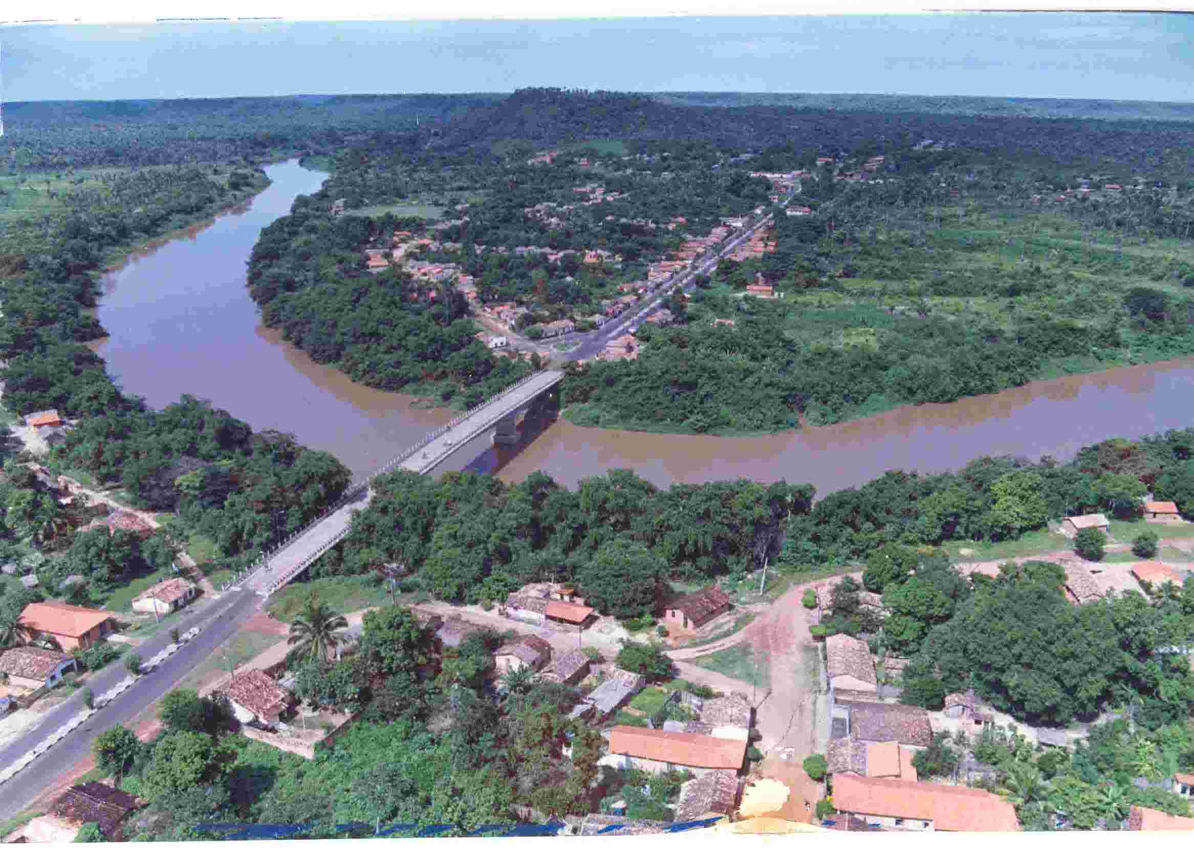 Foto mostrando a ponte sobre o Rio Itapecuru e ao fundo o Bairro Sâo Sebastião.